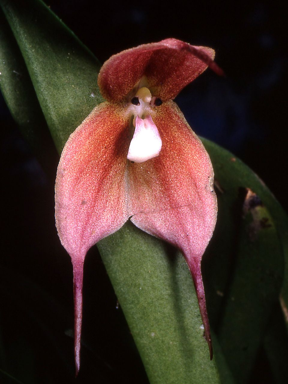 Dracula trichroma